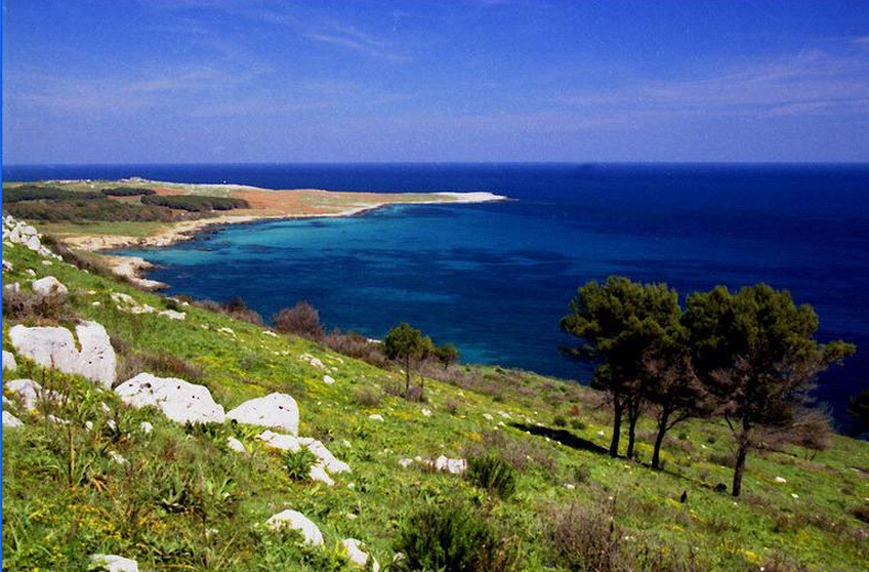 Punta Palascía o Capo d'Otranto, il punto più orientale d'Italia